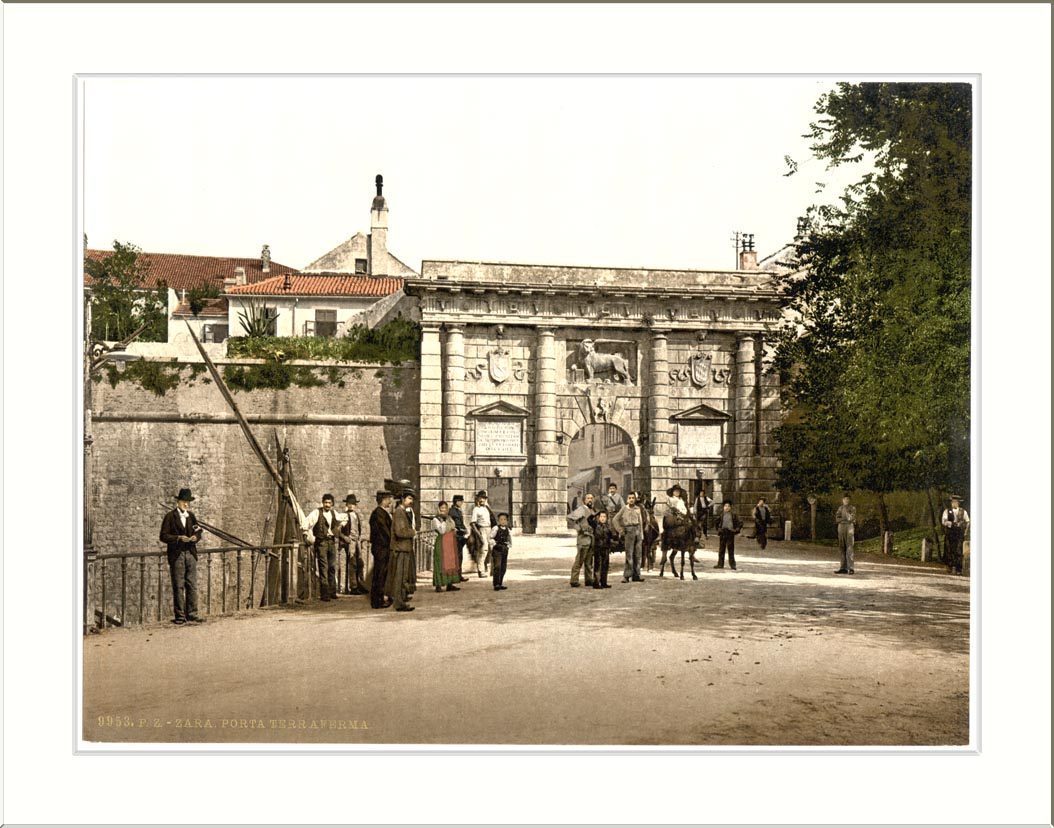 Zara Arch Terra Firma (i.e. Porta di Terraferma) Dalmatia Austro-Hungary